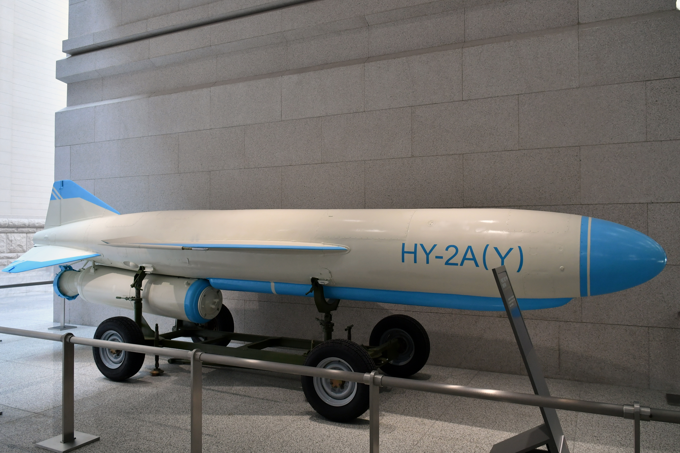 “海鹰”2号甲（HY-2A）岸舰导弹，拍摄于中国人民革命军事博物馆。